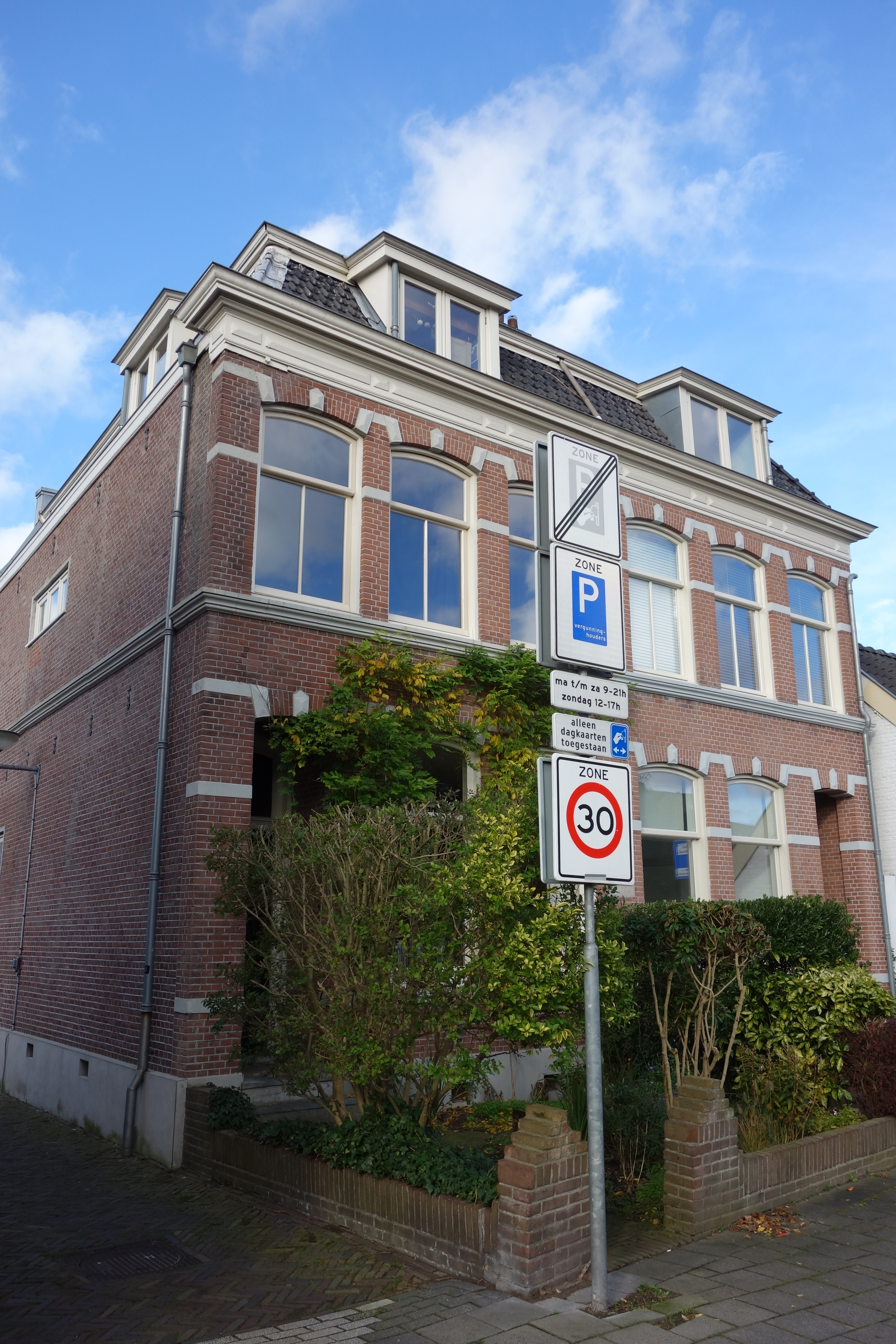 Dubbel woonhuis gebouwd in 1890 voor J. Schouten. De huurwoningen zijn nog altijd in eigendom van het bedrijf J. Schoutens Maatschappij. Tuinmuur aan de achterzijde valt onder de bescherming en is mogelijk uit de bouwtijd.